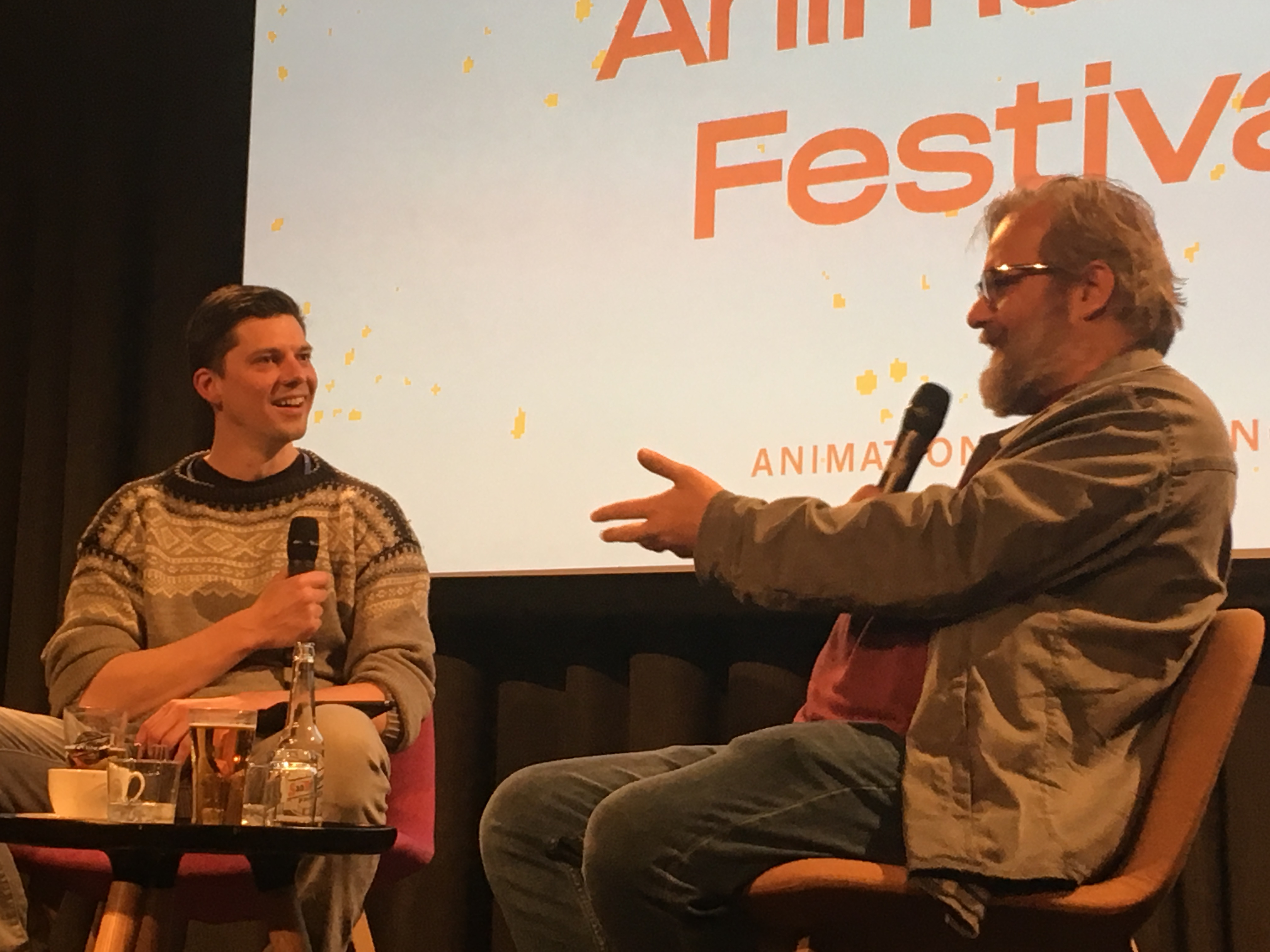 David Skaufjord og Dan Harmon under Fredrikstad Animasjonsfestival 2019